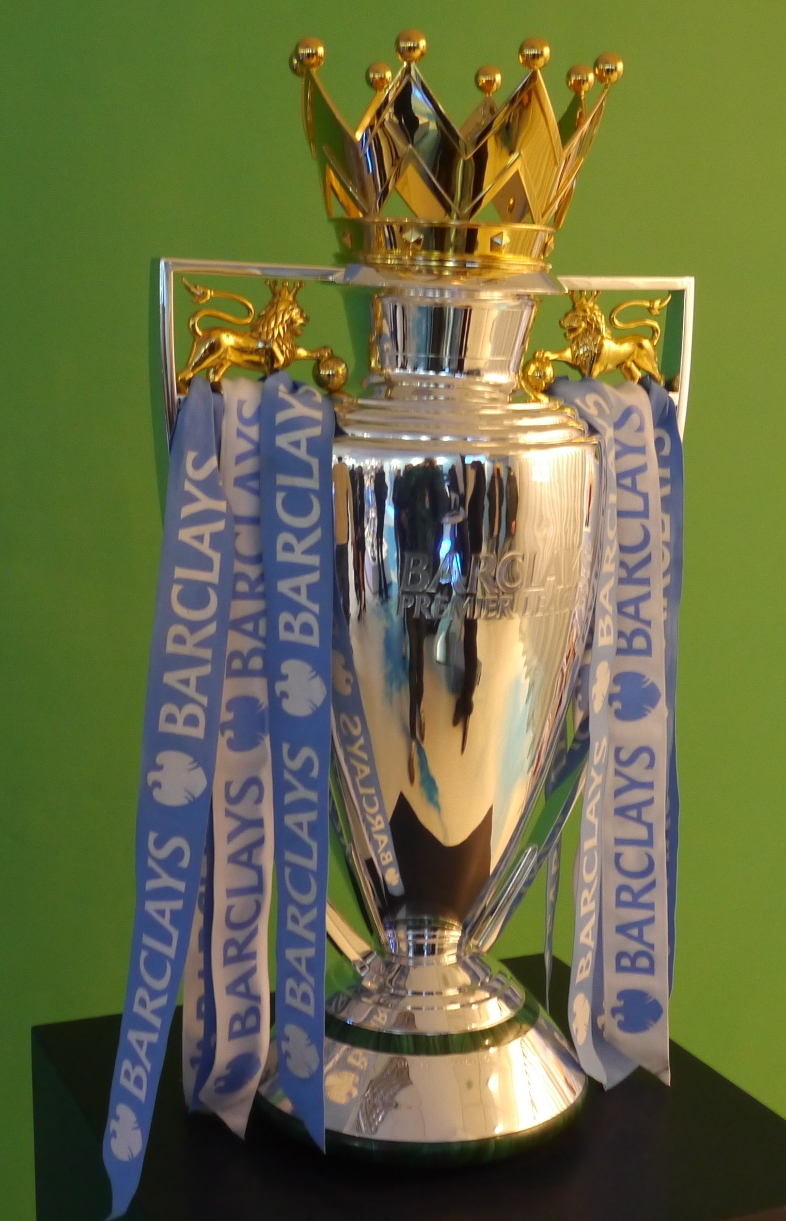 Le trophée de la Premier League remporté par Manchester City durant la saison 2013-2014